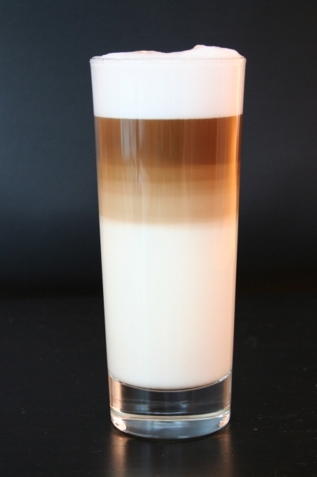 Latte Macchiato in schmalem Glas mit Layering